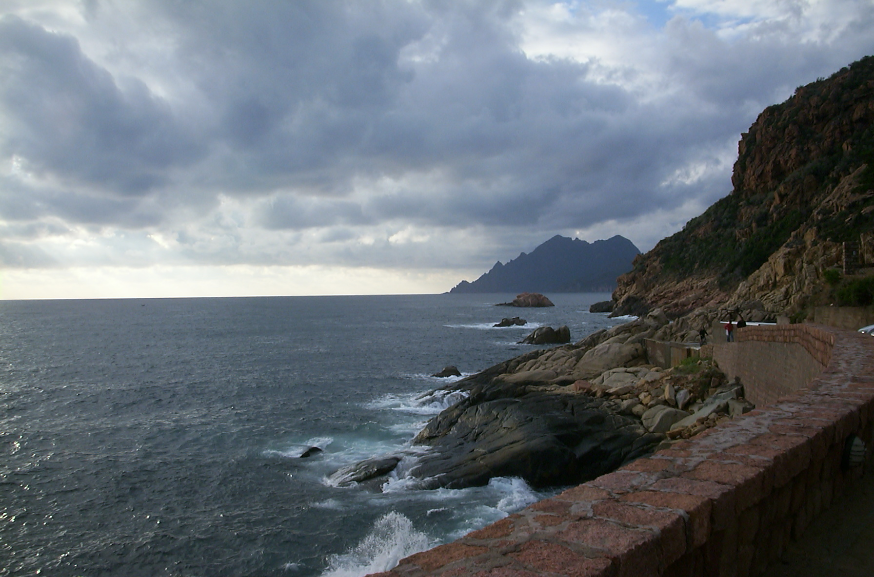 Golfe de Porto (Corse)